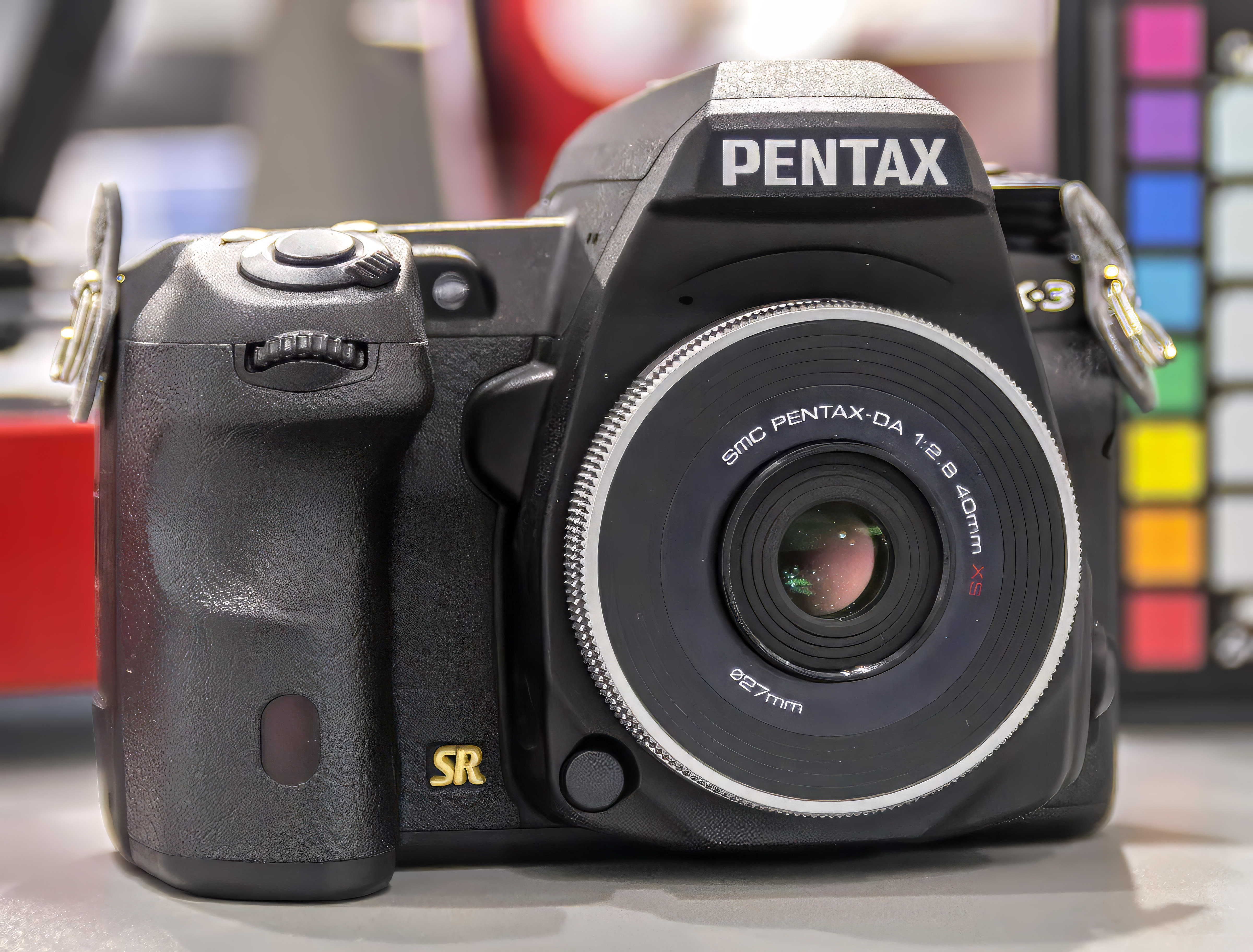 Bilder von der Pentax K-3